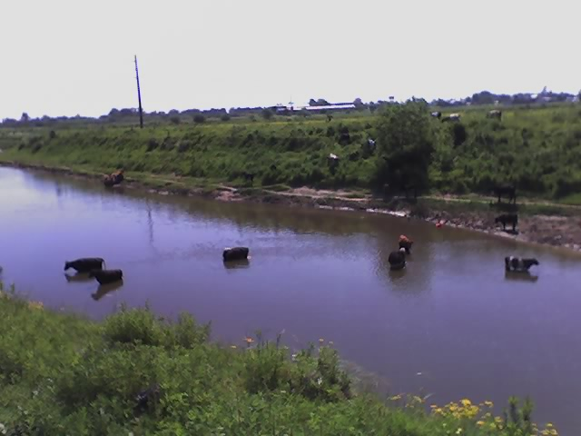 Reconquista River, Buenos Aires Province, Argentina.